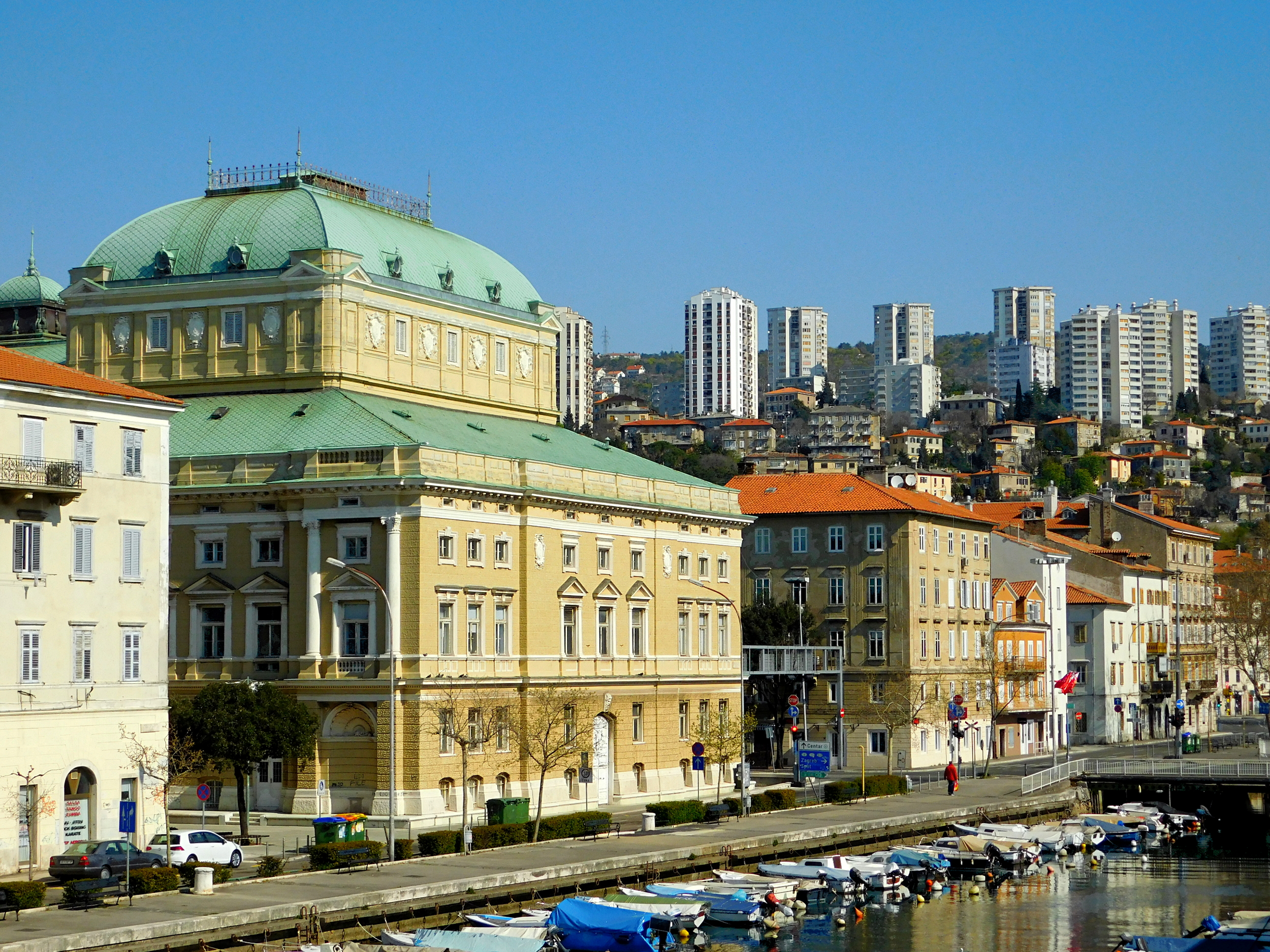 Kazalište Ivana pl. Zajca u Rijeci, strana suprotna glavnom ulazu koja je uz Demetrovu ulicu - pogled na zgradu sa suprotne strane Mrtvog kanala